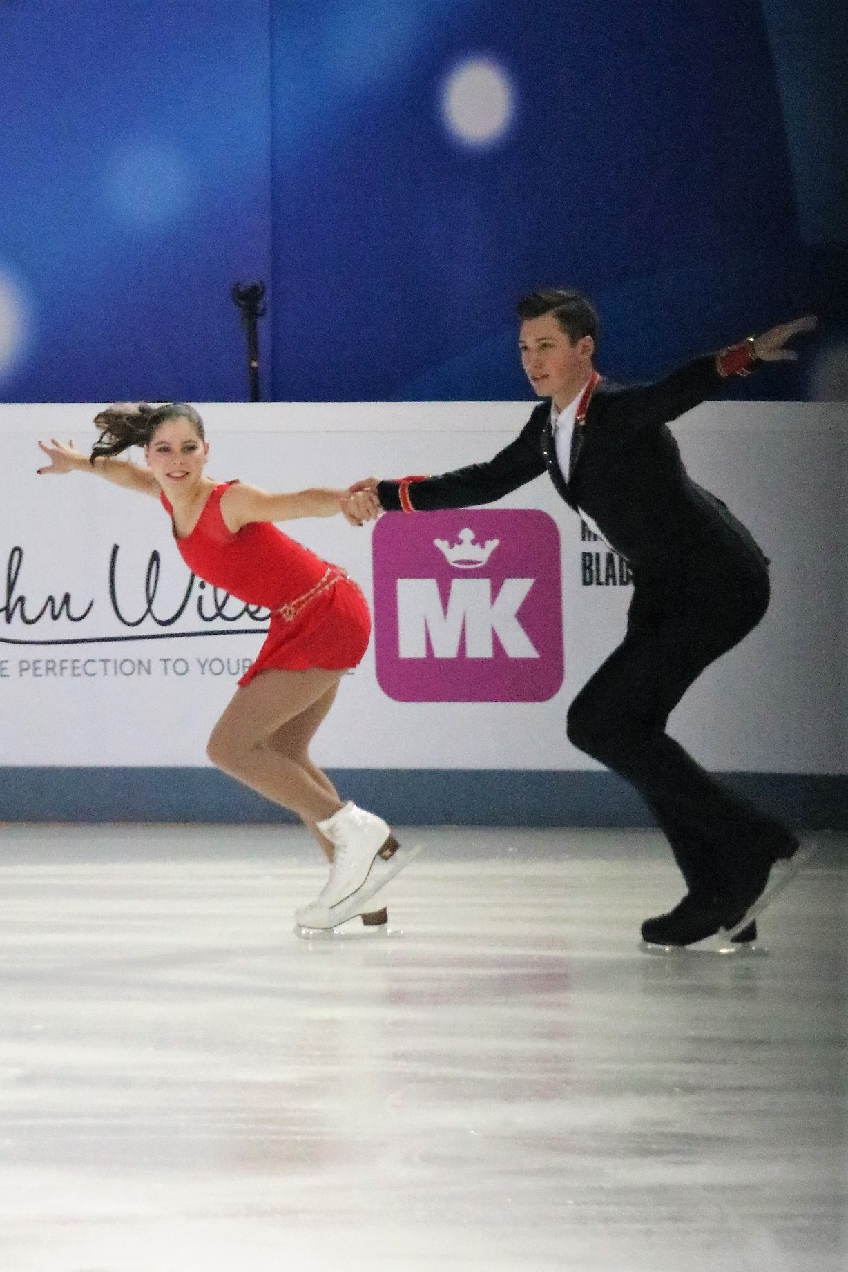 Анастасия Мишина и Александр Галямов на чемпионате России по фигурному катанию на коньках 2019